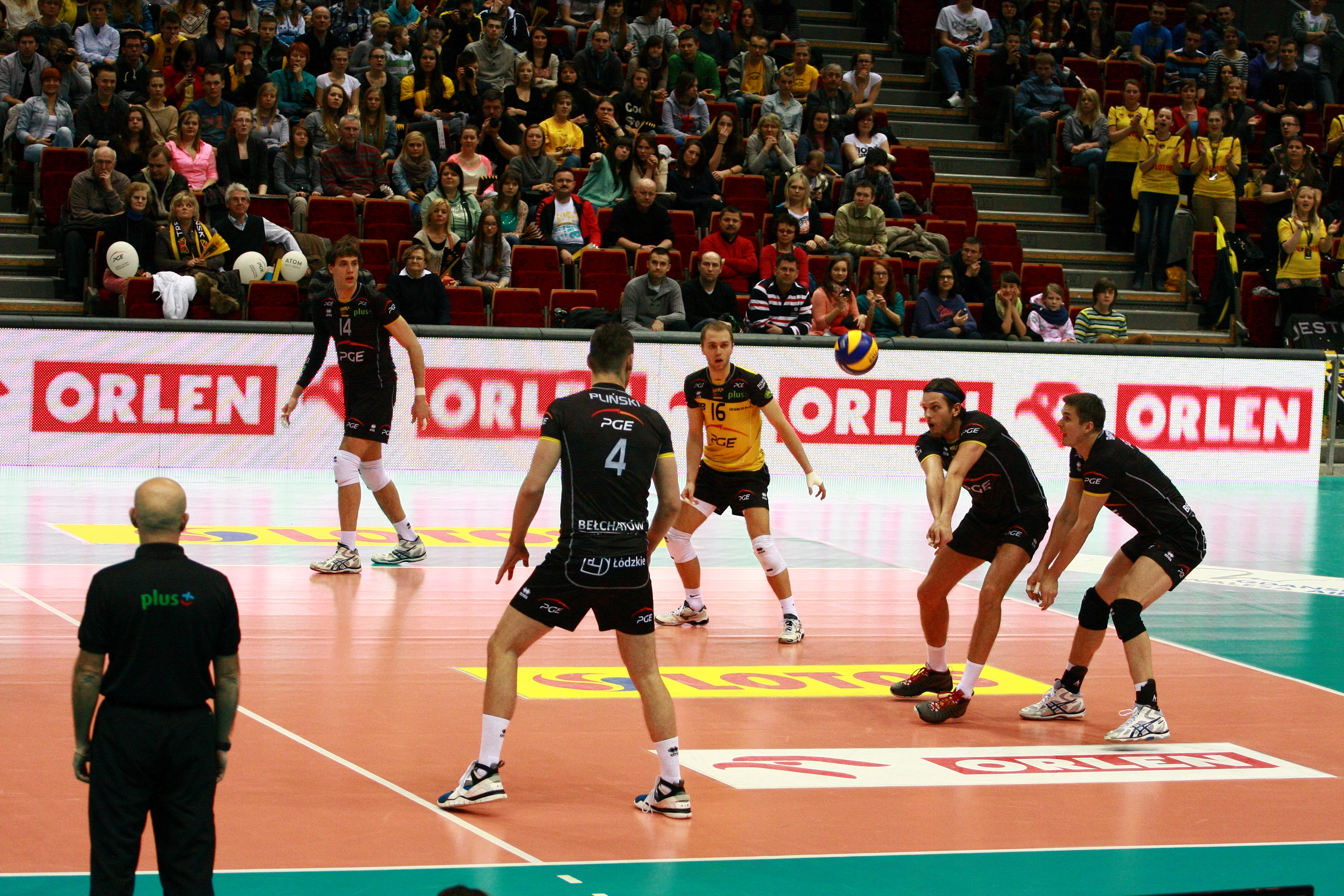 Lotos Trefl Gdańsk vs Skra Bełchatów